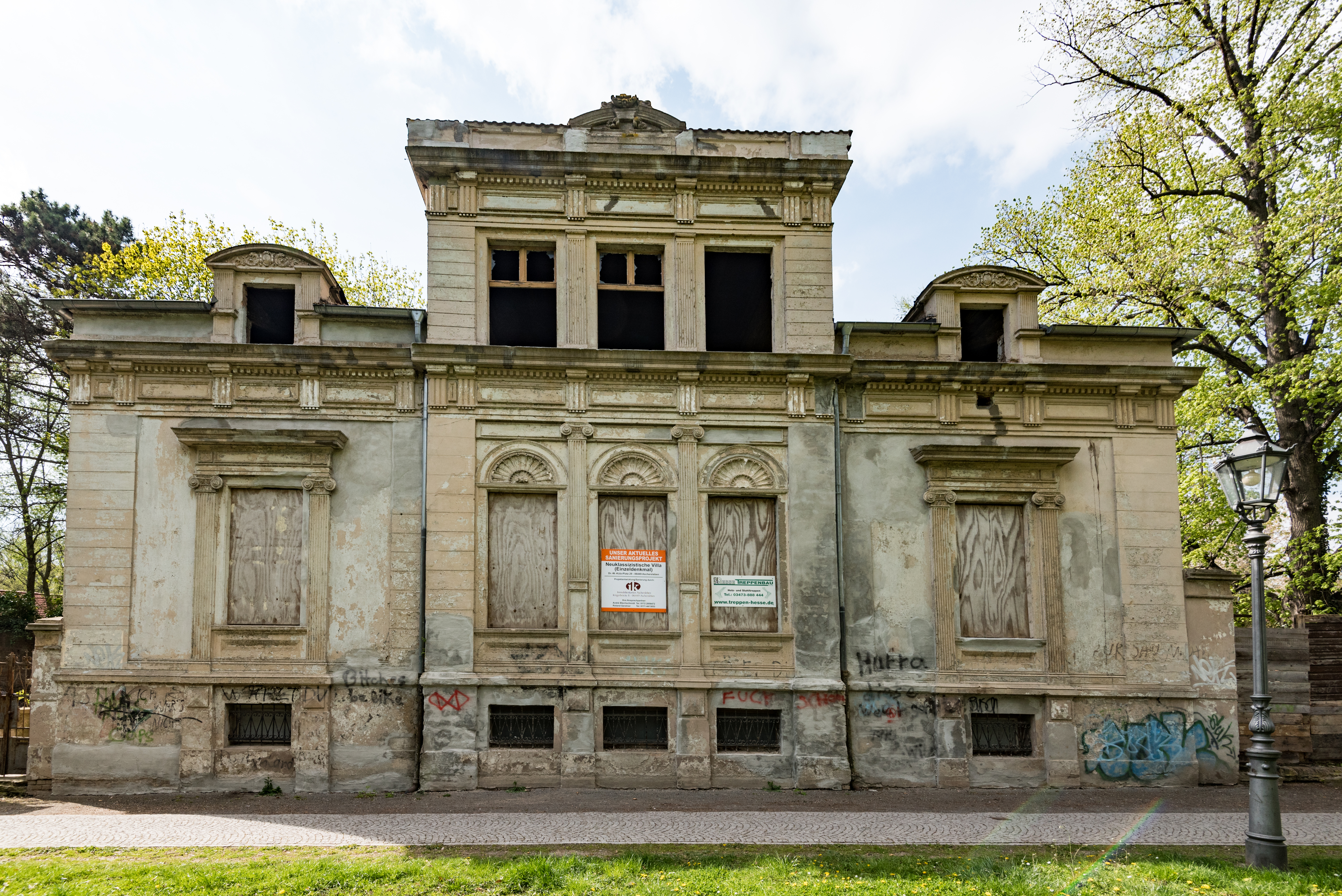 Aschersleben, Dr.-Wilhelm-Külz-Platz 29